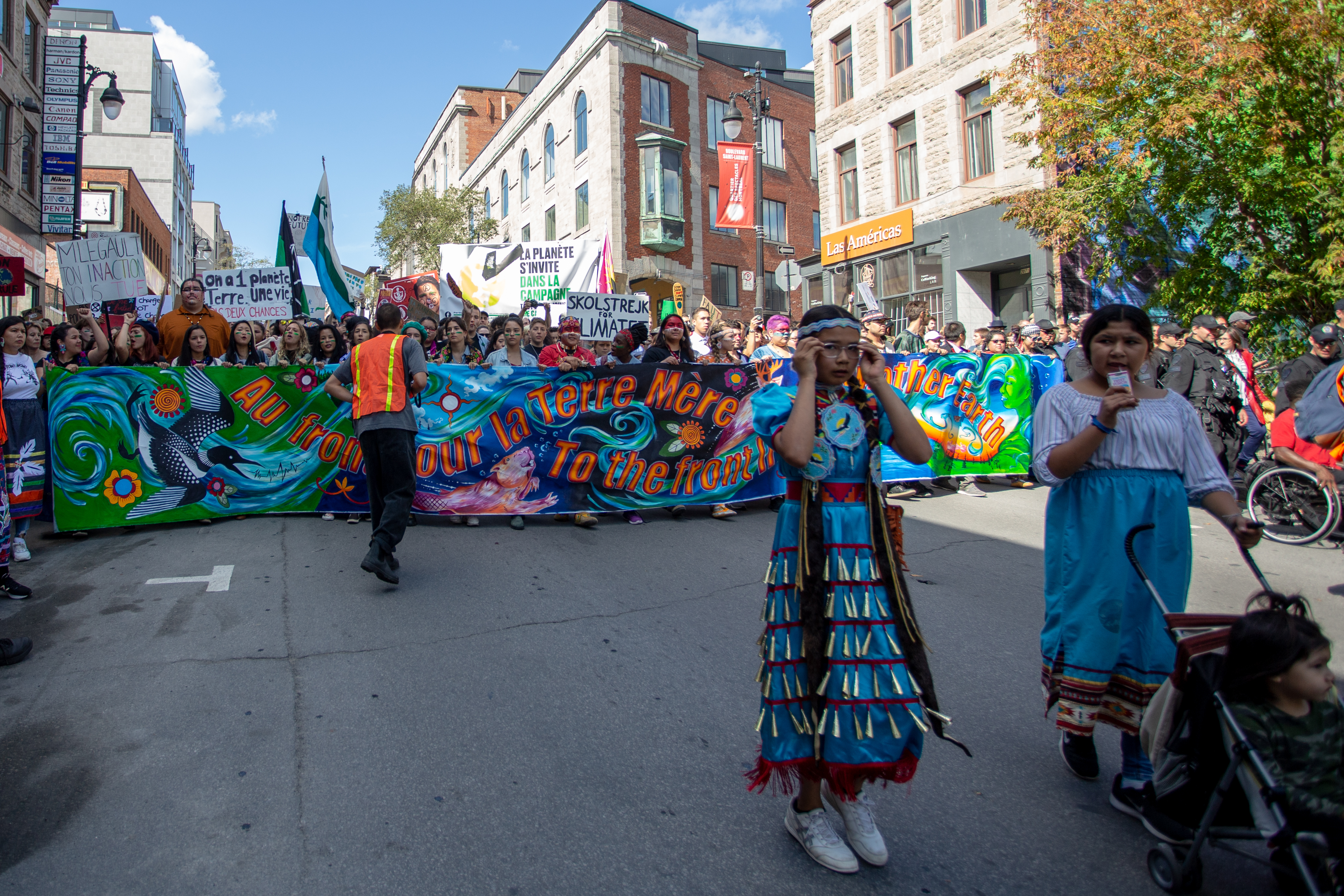 Marche pour le climat du 27 Sept 2019 à Montreal.